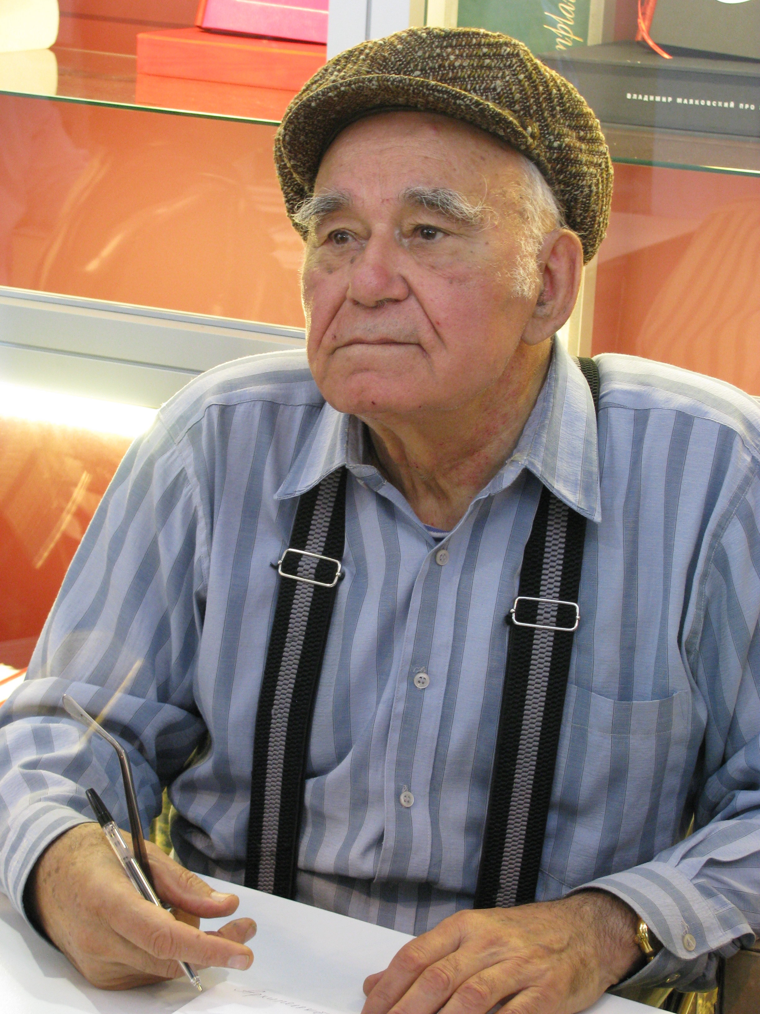 Василий Песков на ММКВЯ-2011